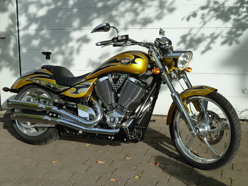 Victory Jackpot 2010 Tequila Gold with Extreme Graphics